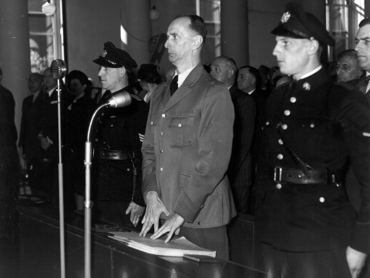 Hanns Albin Rauter voor het Bijzonder Gerechtshof in het voormalig paleis aan de Kneuterdijk, Den Haag, 1 april 1948. Foto Ben van Meerendonk / AHF, collectie IISG, Amsterdam